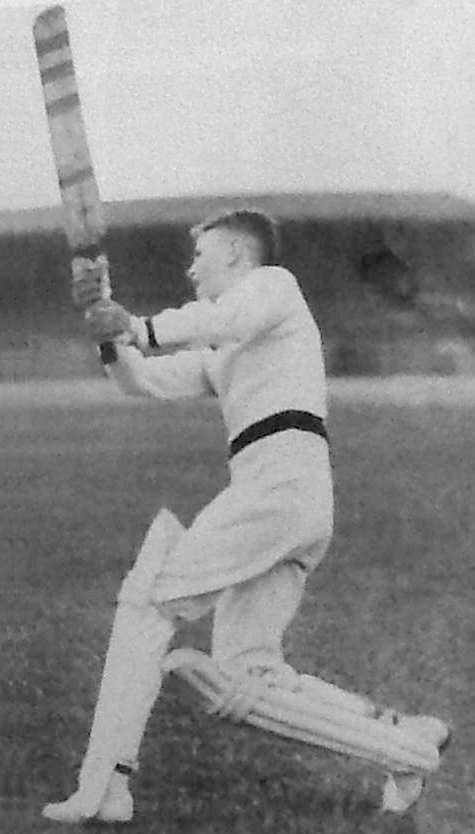 Keith Miller